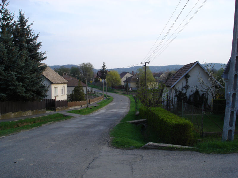 Nógrádmarcali utcakép (Nógrád megye)